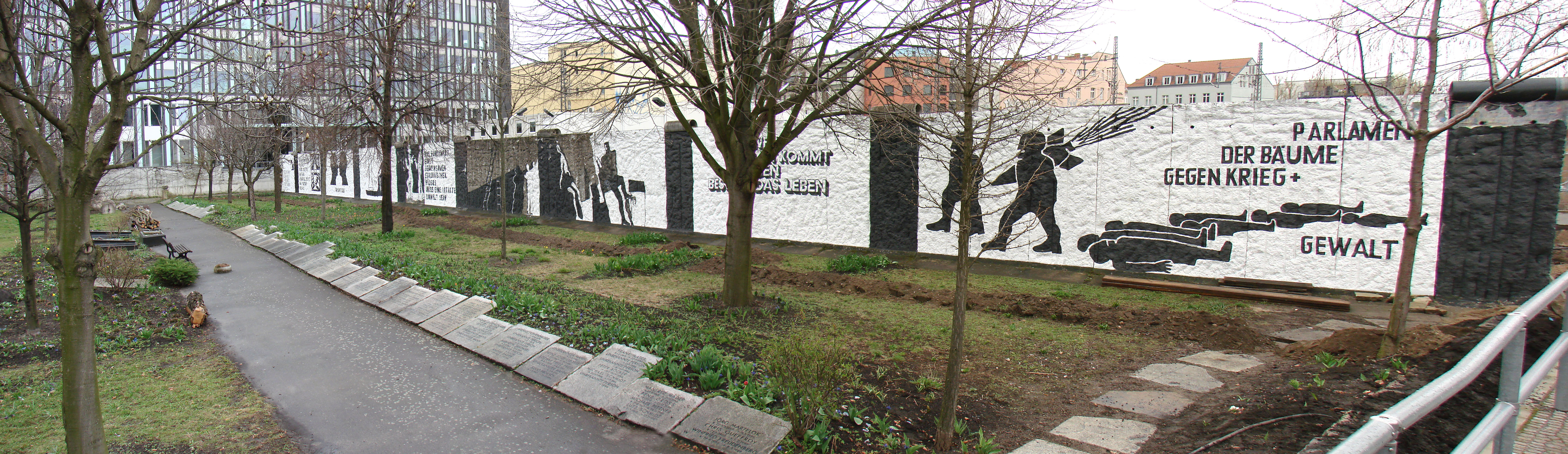 Parlament der Bäume gegen Krieg und Gewalt an der Spree in Berlin Mitte. Im März 2010 aufgenommen und aus drei Fotos gesticht.